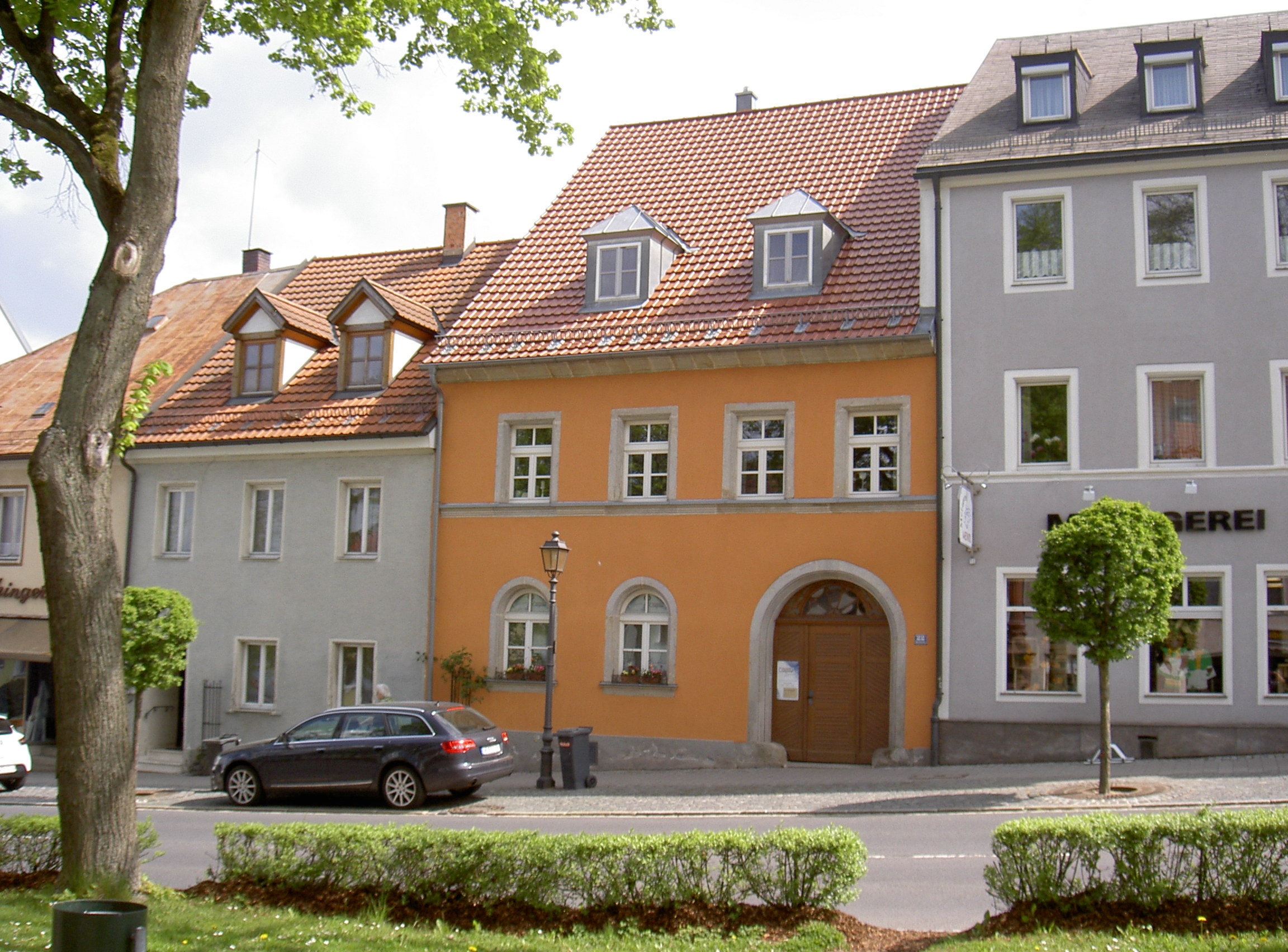 Vohenstrauß Marktplatz 22